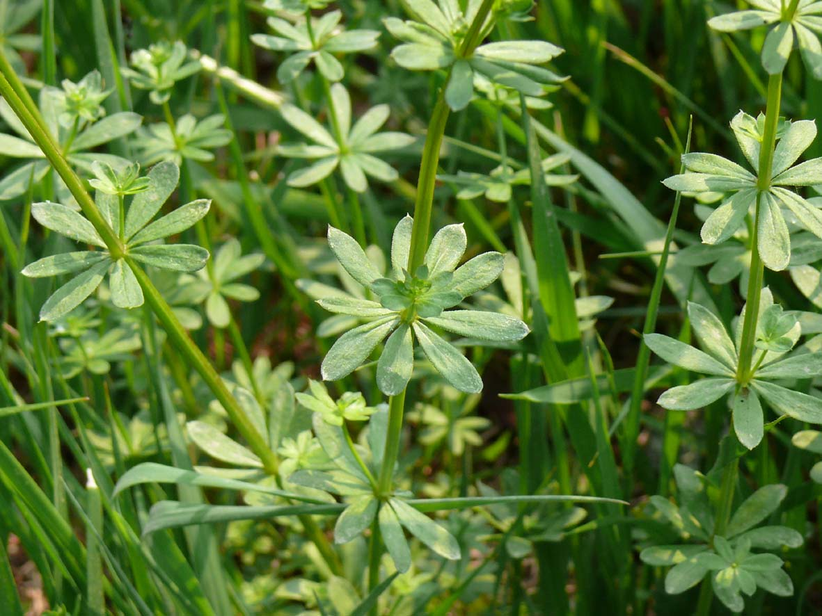 it: foglie a fillatassi verticillata en: Whorled leaves fr: feuilles verticillées